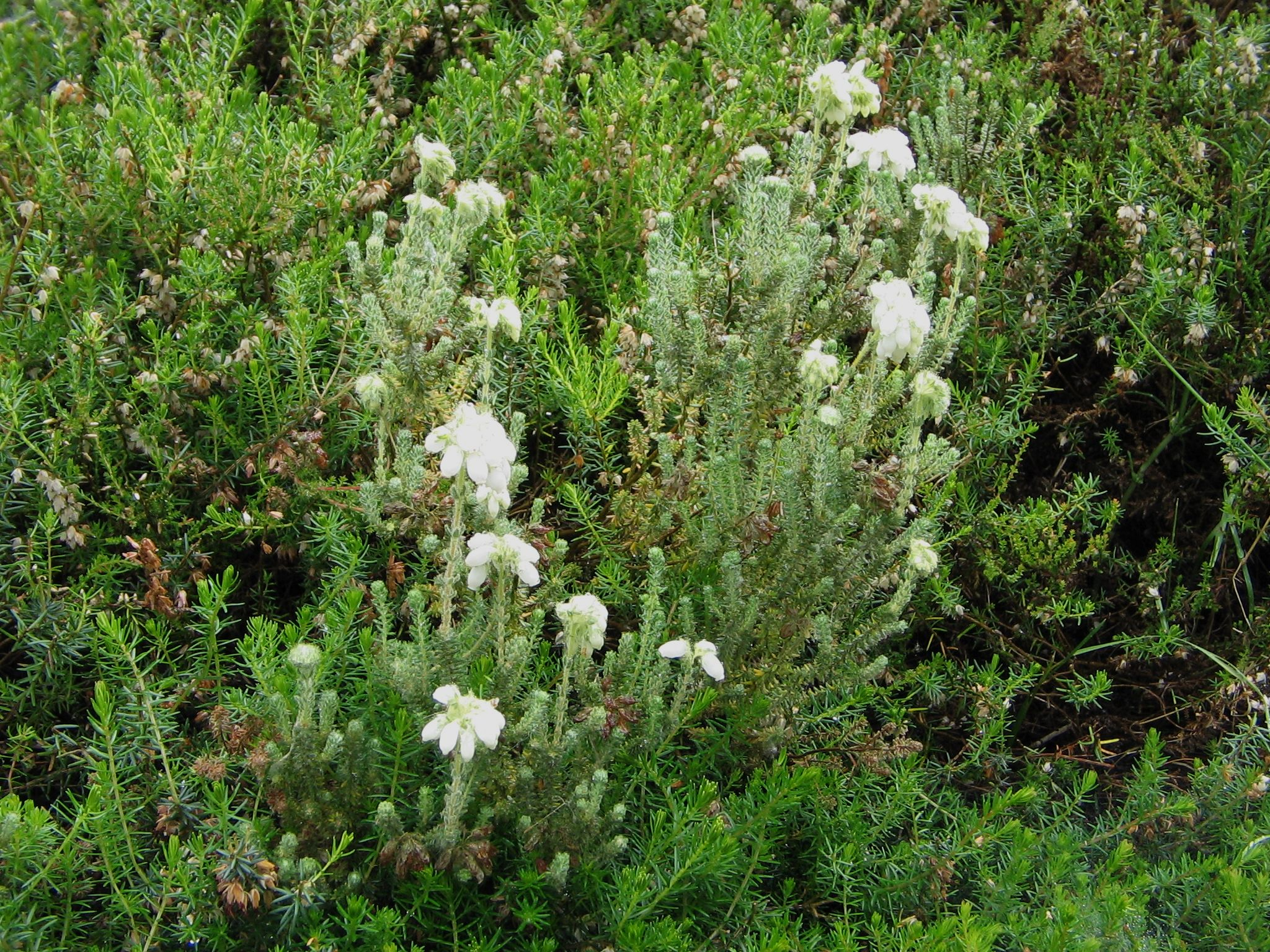 Erica tetralix 'Alba Mollis'